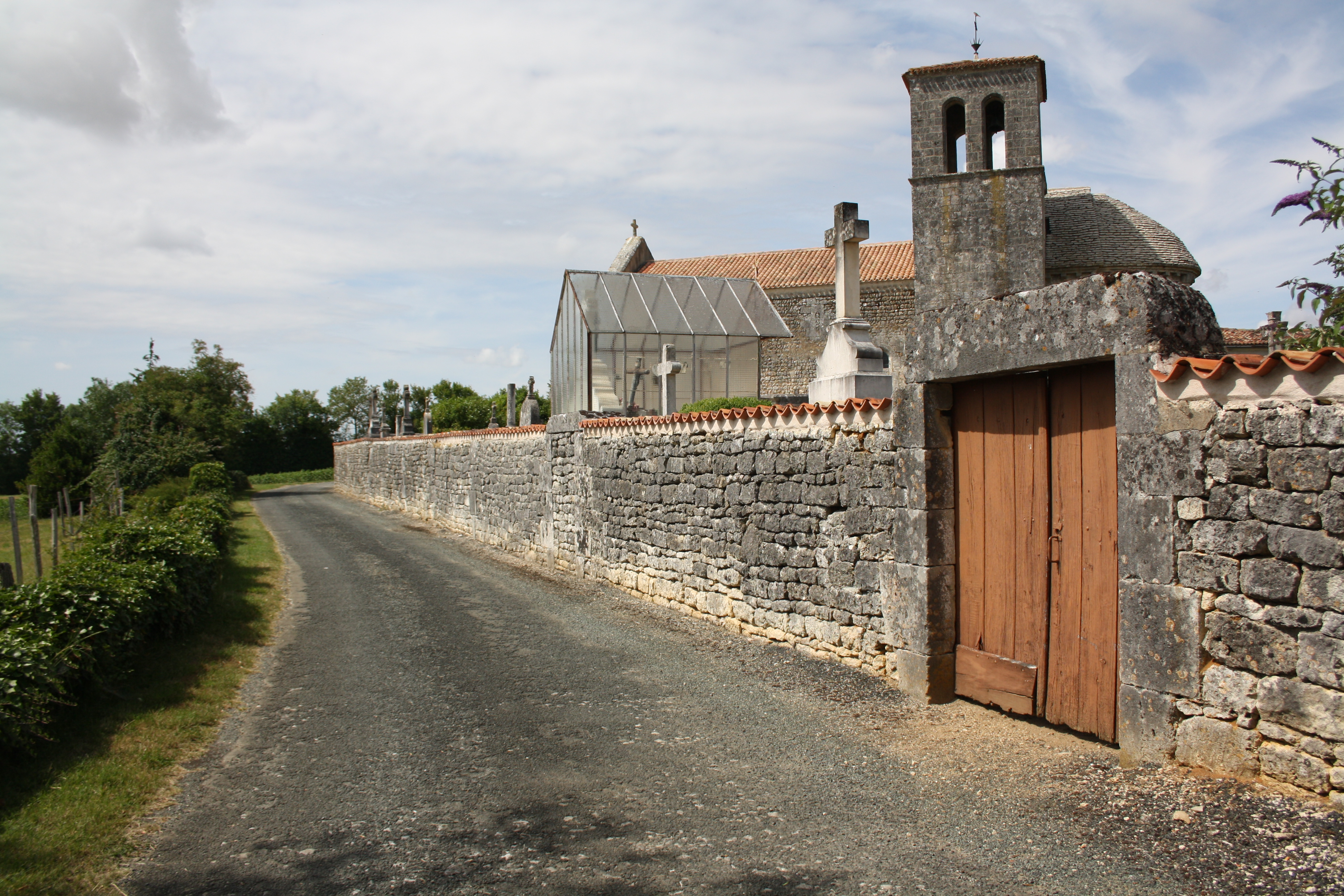 Église Saint-Martin de Taillant (Charente-Maritime, France).